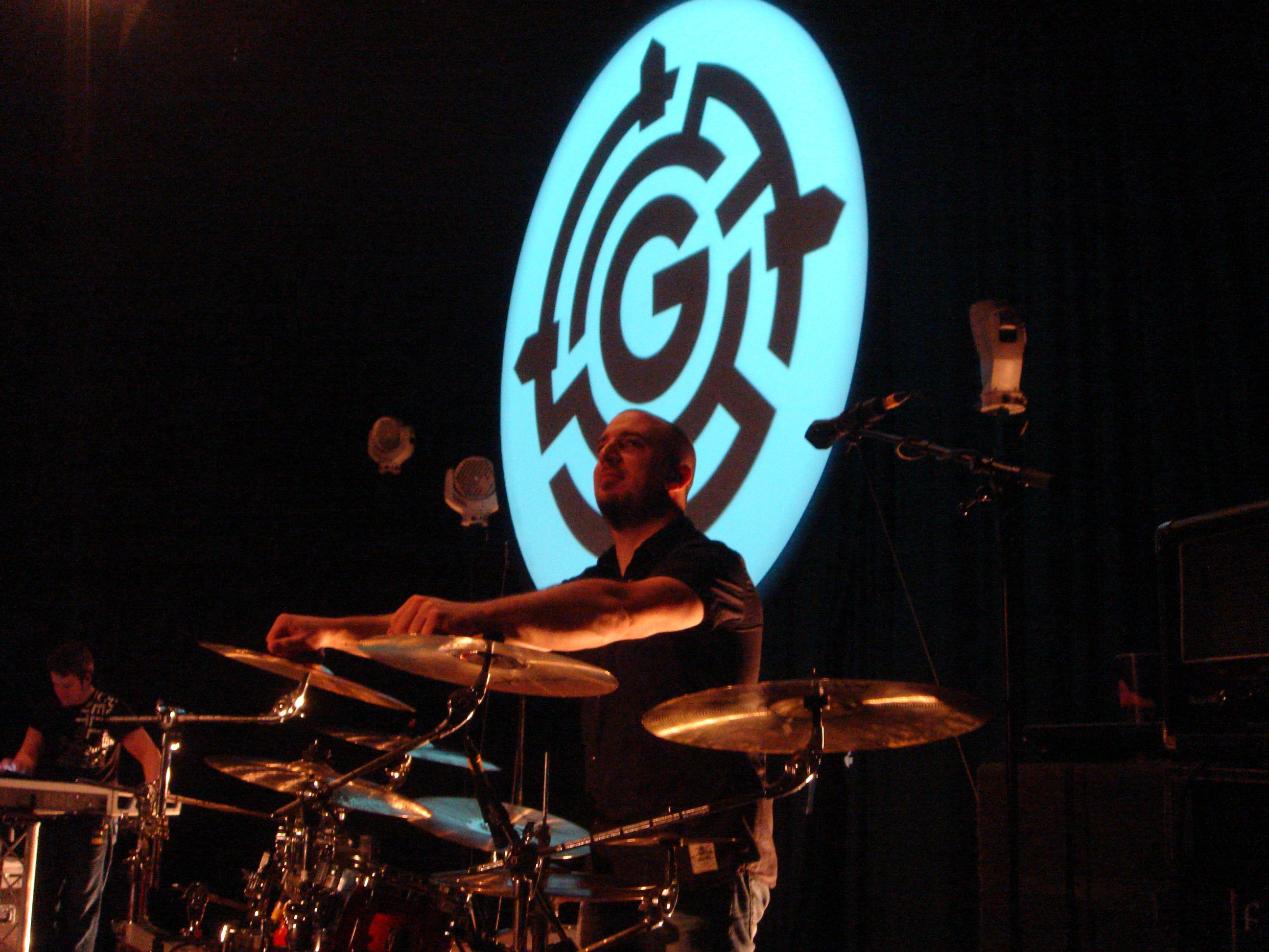 Torsten Bugiel beim Konzert mit Thomas Godoj